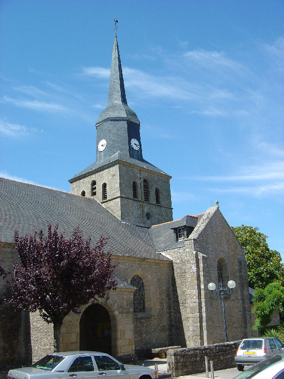 Eglise Notre-Dame-de Kerdro- Locmariaquer